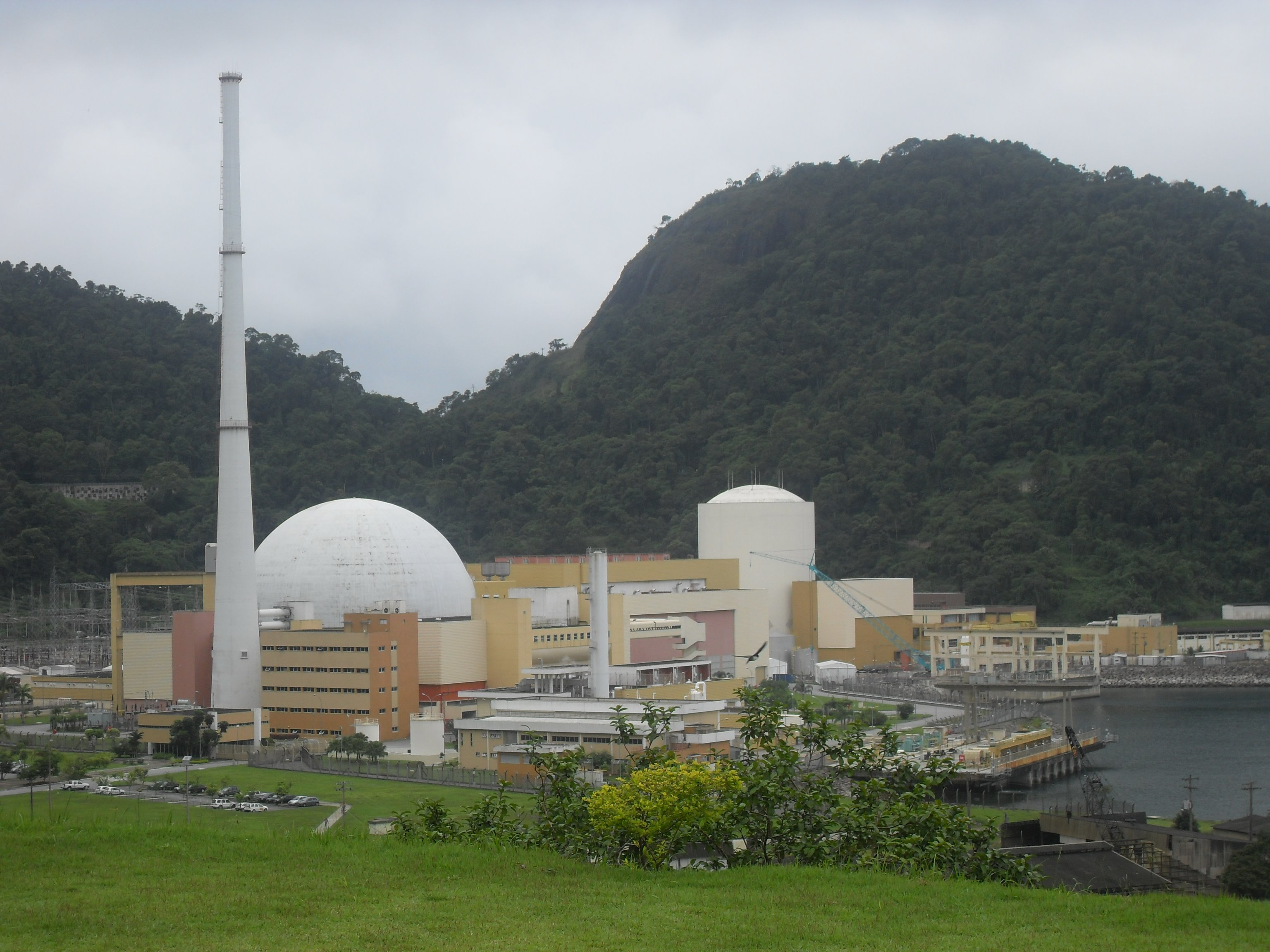 Vista das usinas de Angra.